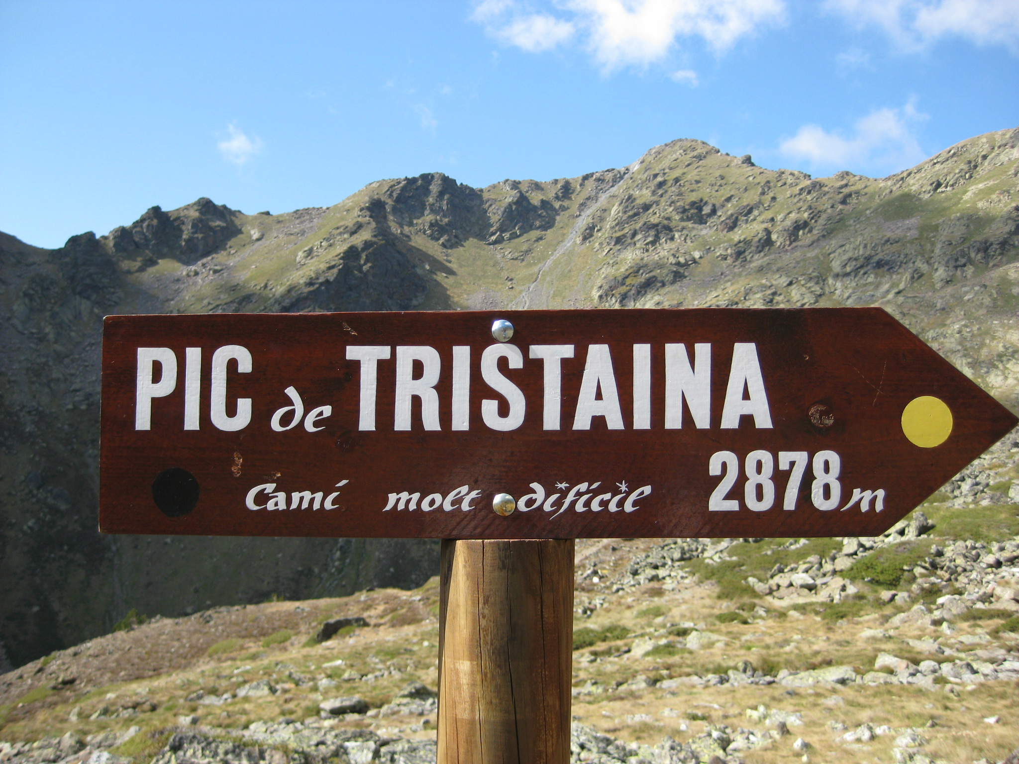 Cartell del Pic de Tristaina